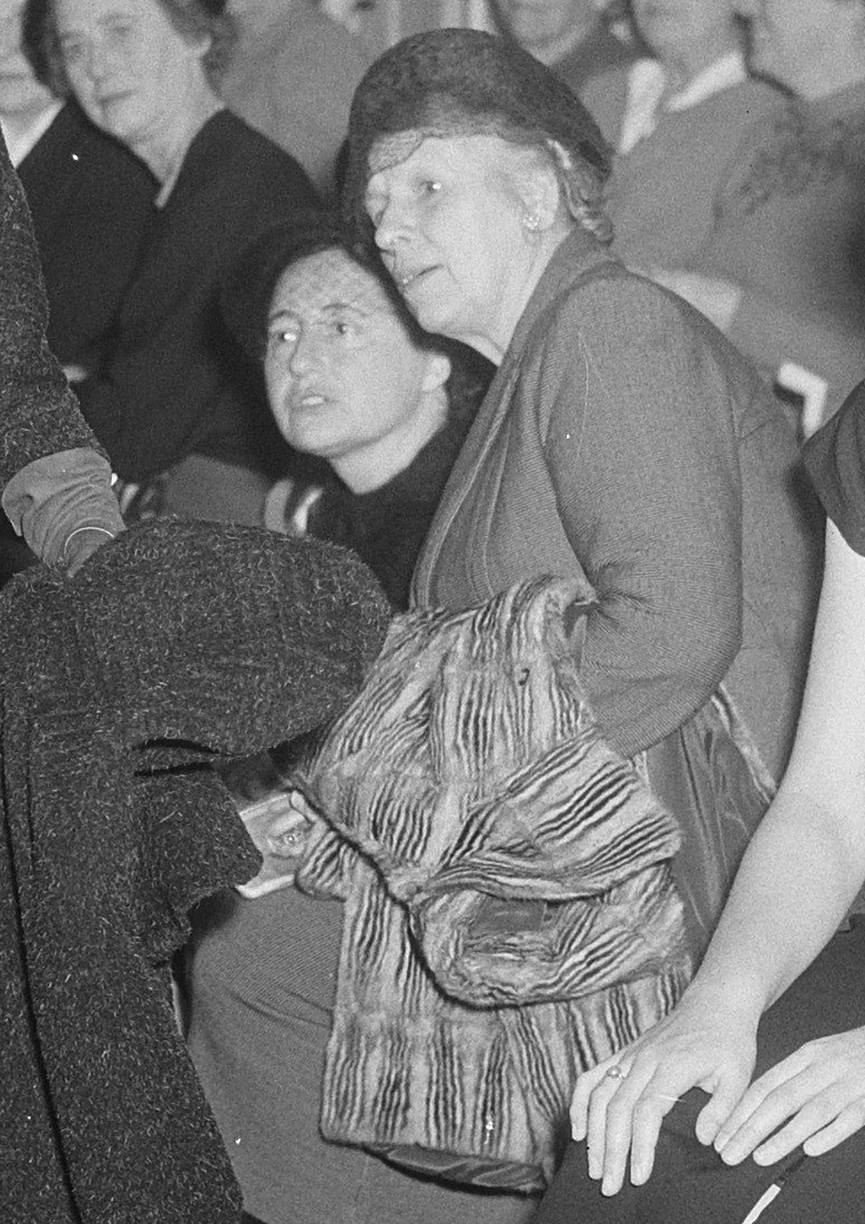 Collectie / Archief : Fotocollectie Anefo Reportage / Serie : [ onbekend ] Beschrijving : AVSV 50 jaar modeshow Datum : 30 oktober 1952 Trefwoorden : modeshows Instellingsnaam : AVSV Fotograaf : Pot, Harry / Anefo Auteursrechthebbende : Nationaal Archief Materiaalsoort : Glasnegatief Nummer archiefinventaris : bekijk toegang 2.24.01.09 Bestanddeelnummer : 905-3892